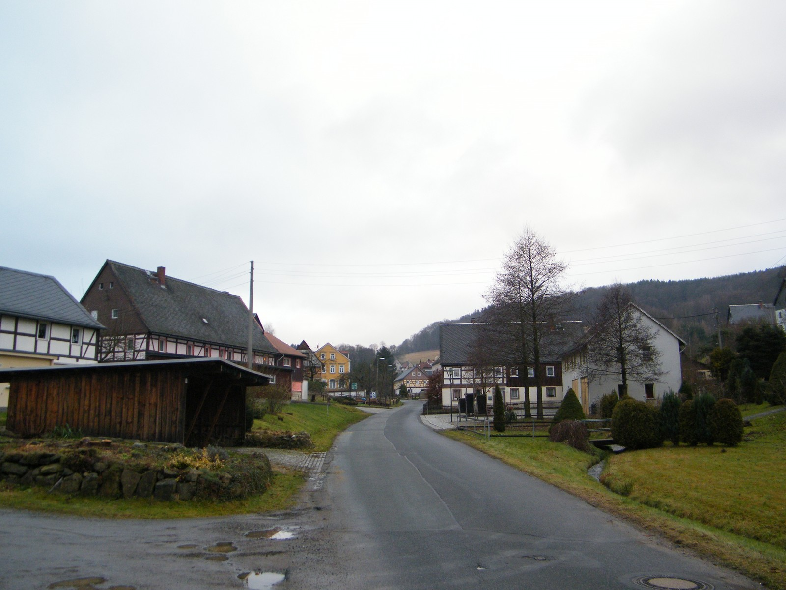 Schönbach bei Sebnitz